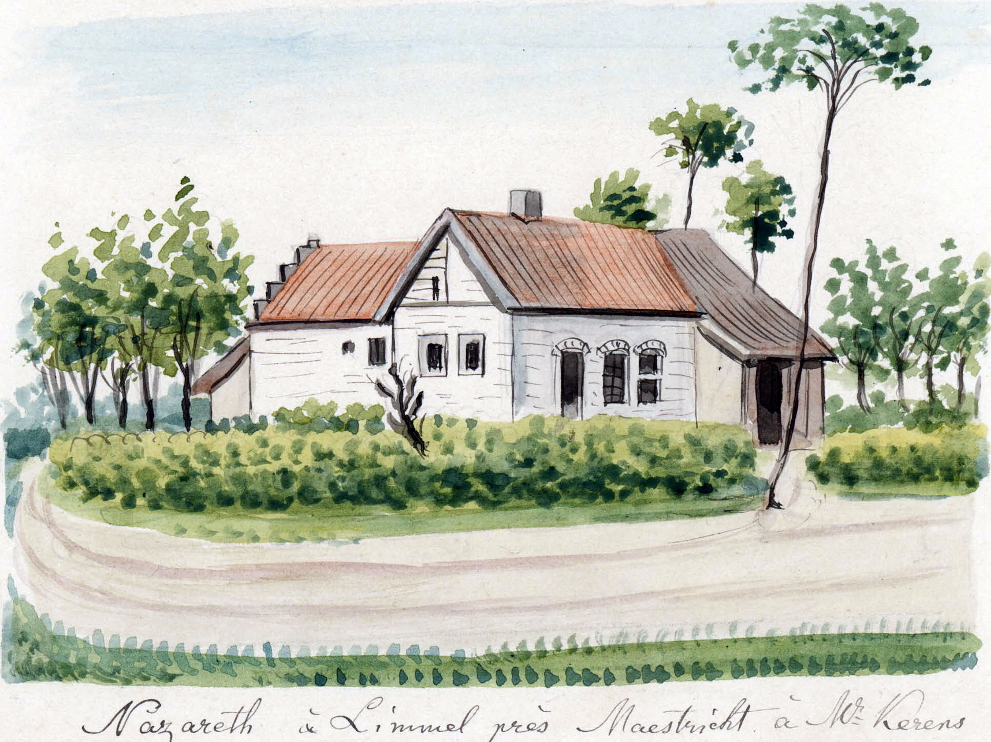 Tekening van Philippe van Gulpen van kasteel Bethlehem en hoeve Nazareth in Limmel bij Maastricht, omstreeks 1840. Collectie van der Noordaa in het RHCL, Maastricht, CVDN 321.